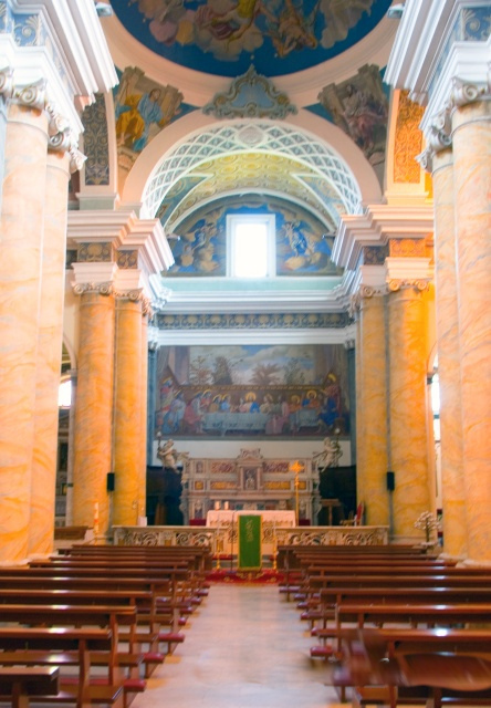 Baranello (CB), 2012, Chiesa di San Michele Arcangelo.